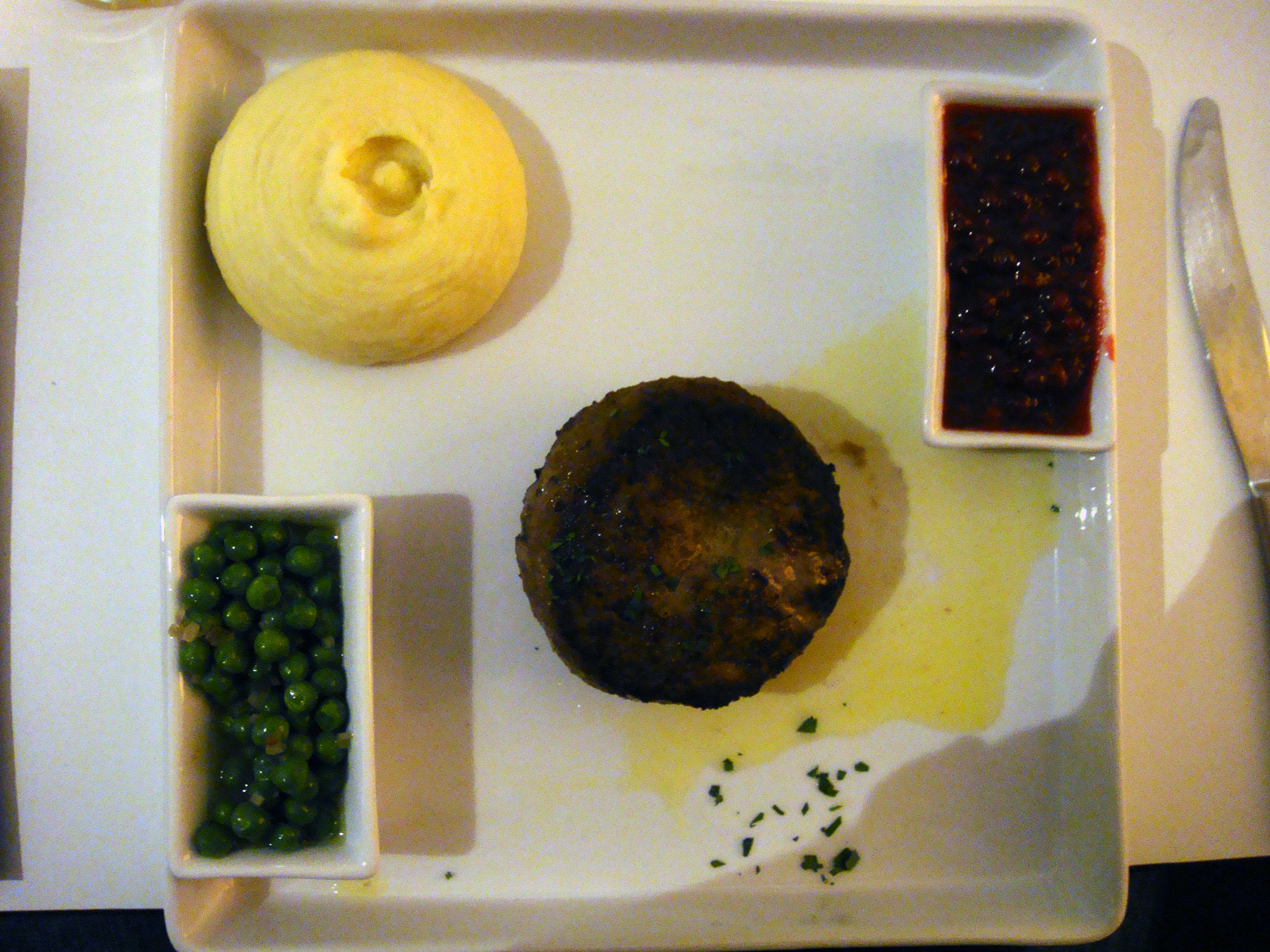 Wallenbergare.